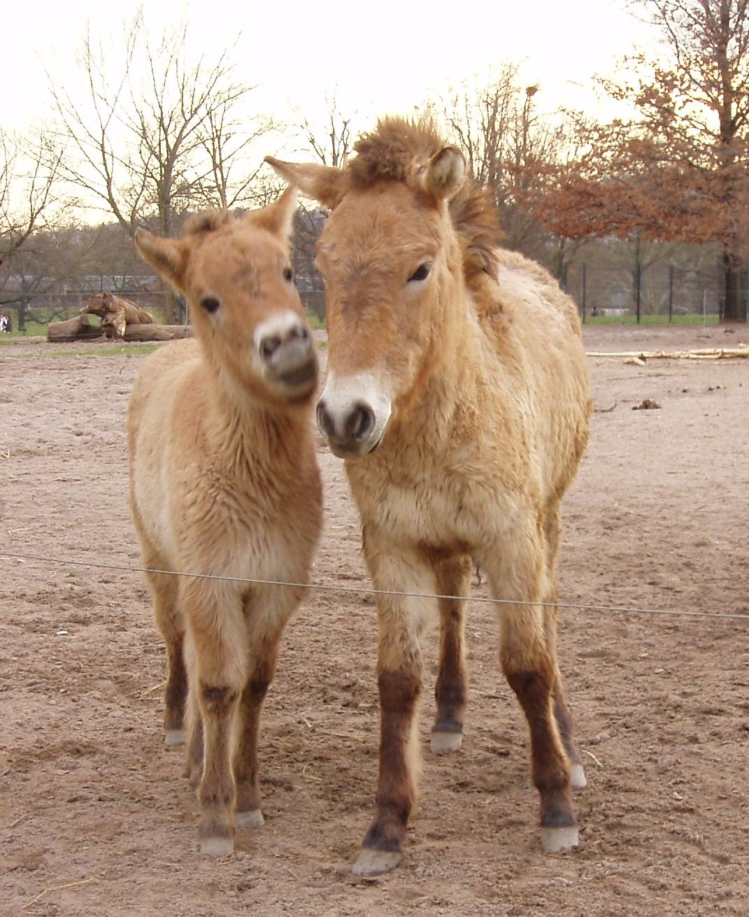 Przewalskifohlen in der Wilhelma